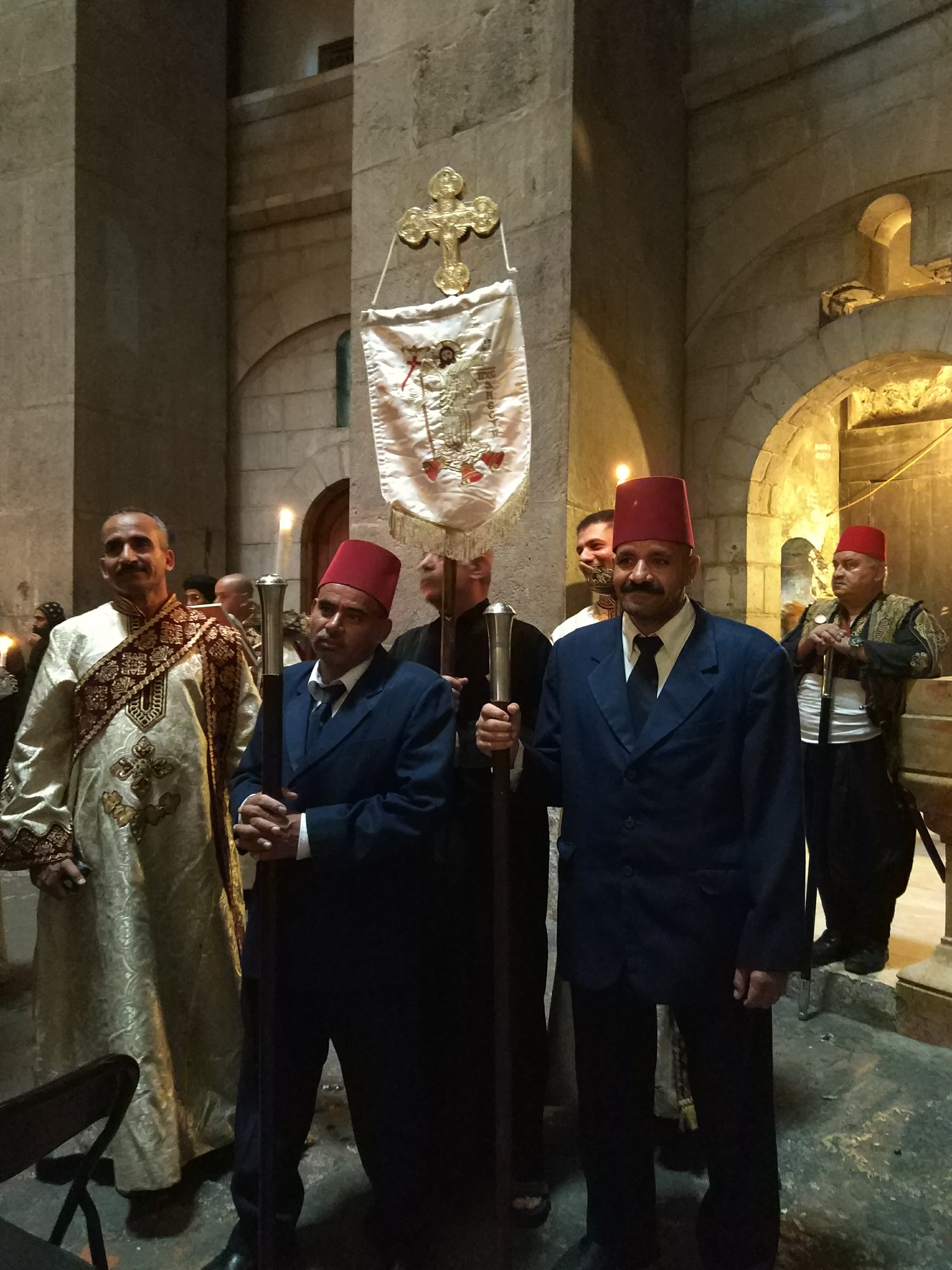 כמרים קופטים בכנסיית הקבר